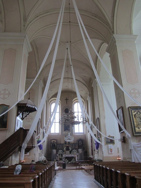 Астравец. Касцёл Святых Касмы і Даміяна